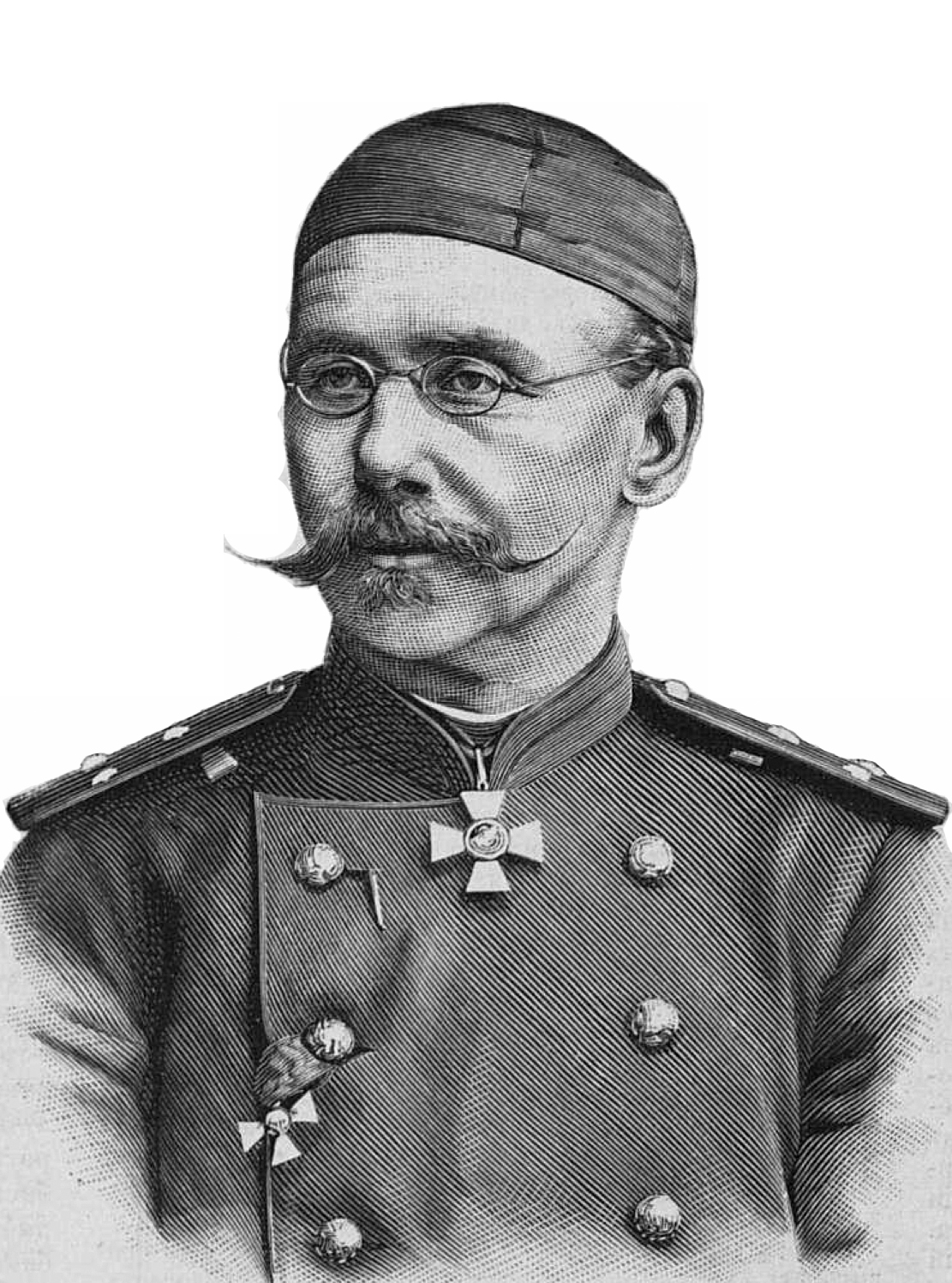 Генерал Абрамов Александр Константинович